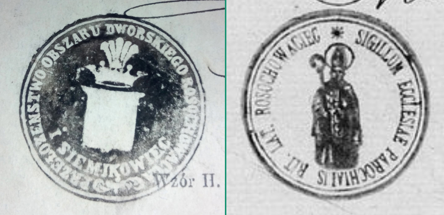 печатки Росоховатця 1895